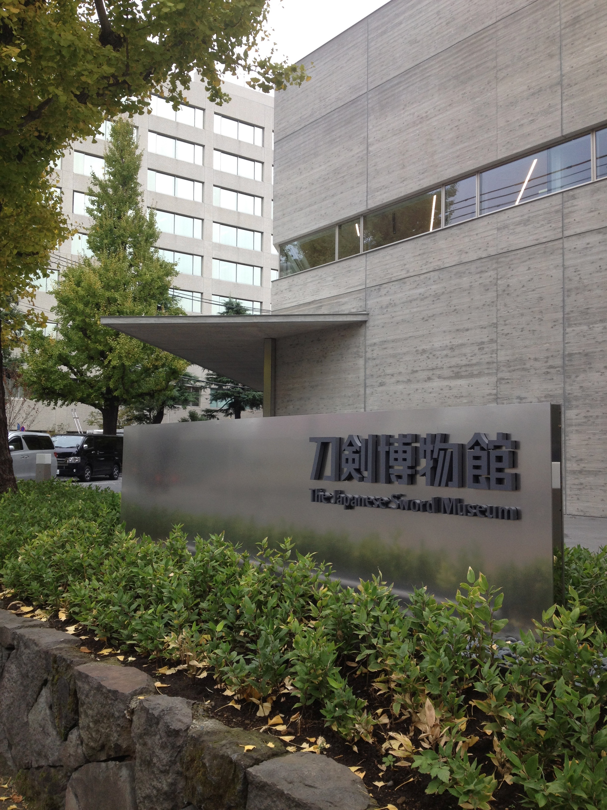 刀剣博物館（新）